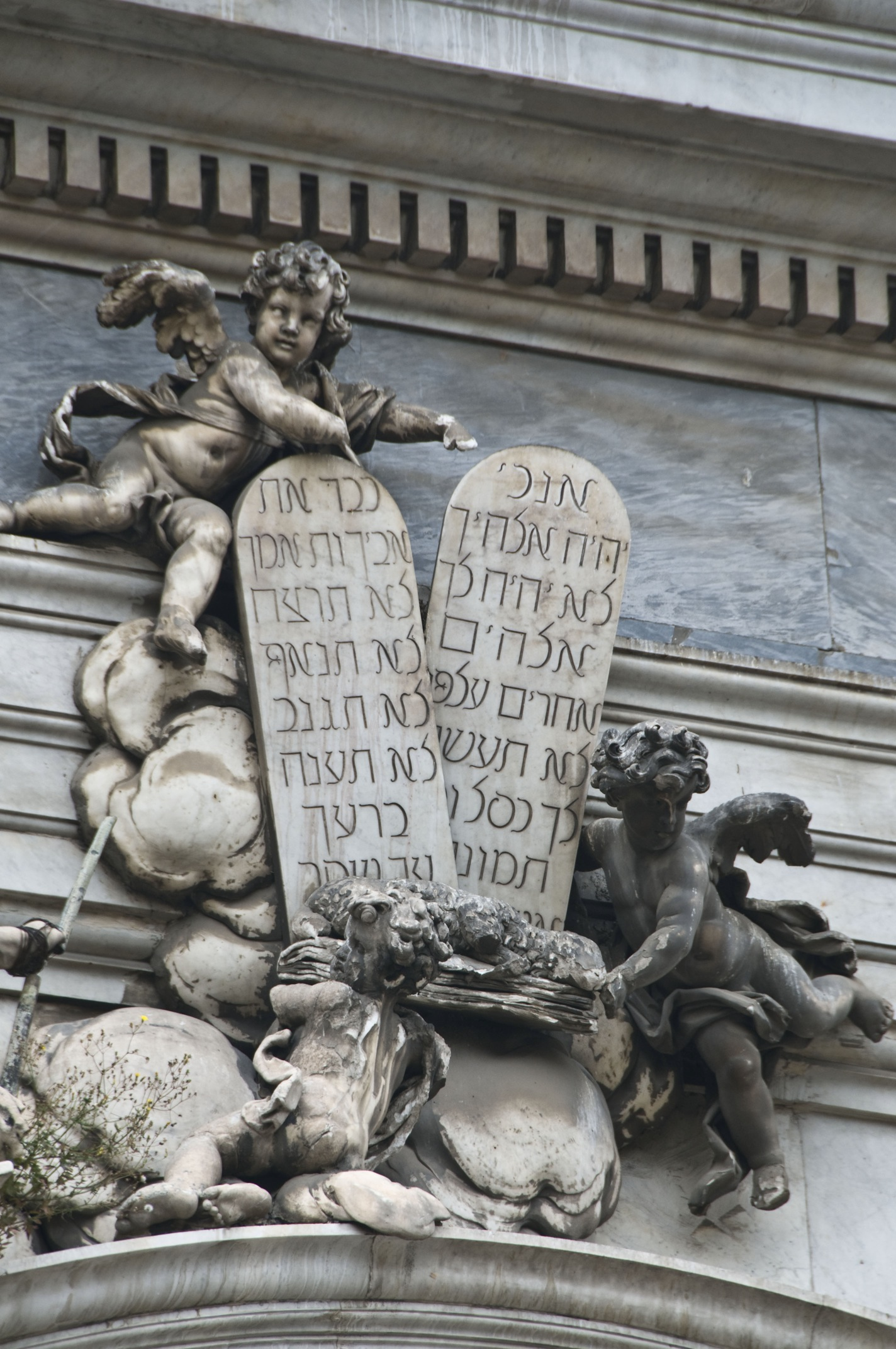 Gruppo scultoreo sovrastante il portale centrale della Chiesa dei Girolamini di Napoli. Sono riprodotte le tavole dei comandamenti con il testo biblico in ebraico.